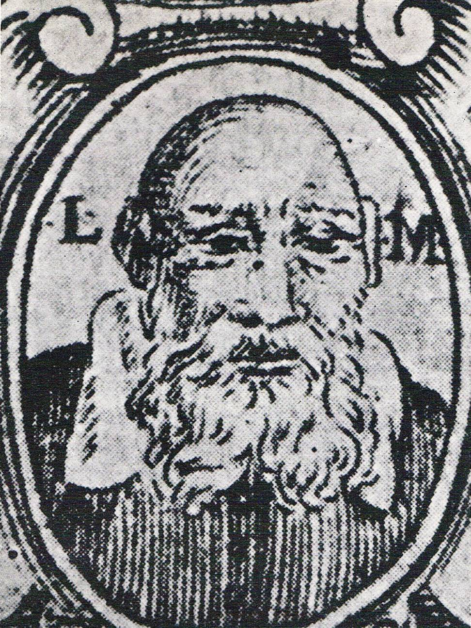 יהודה אריה ממודנה